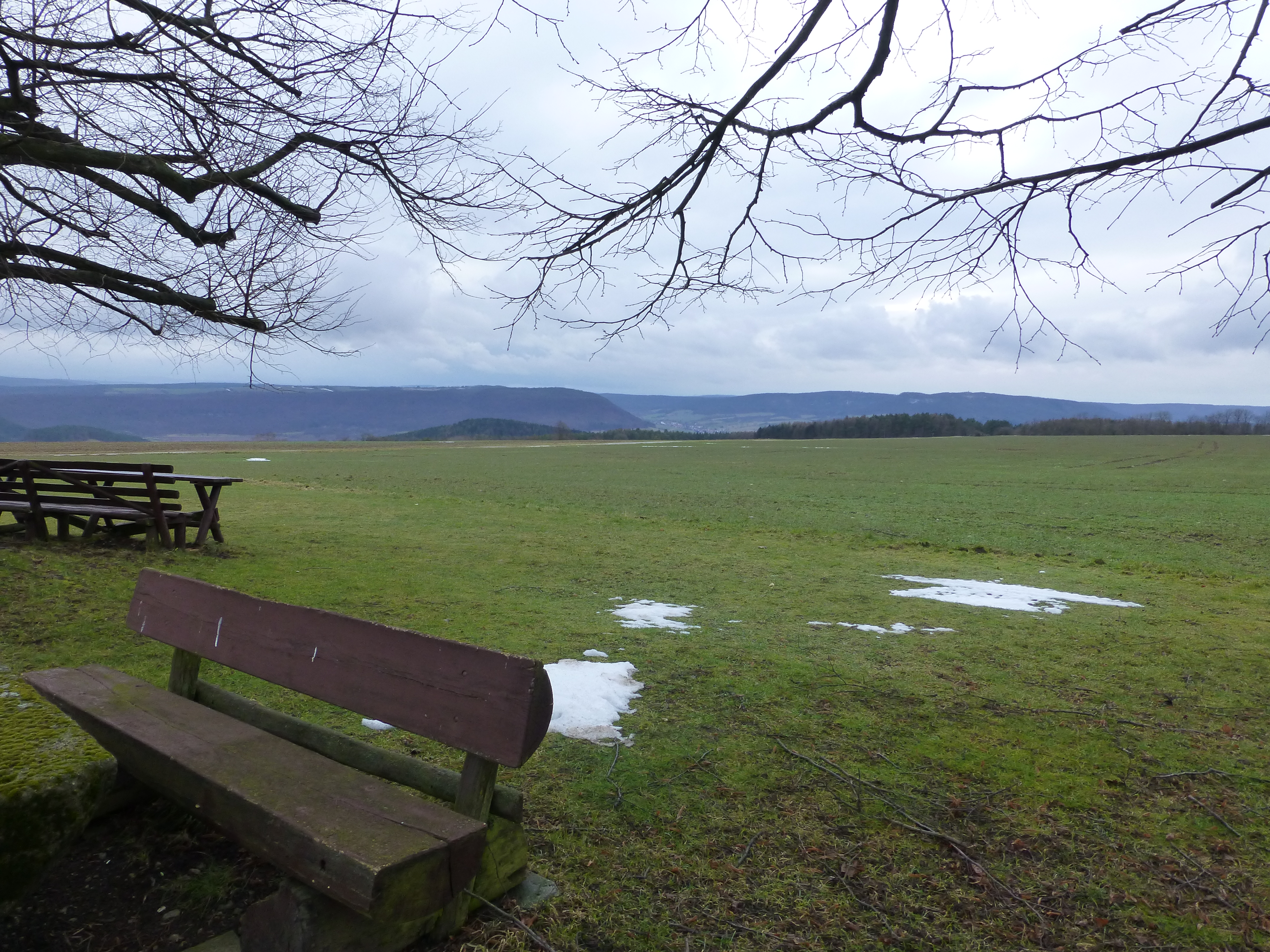 Blick von der Lindenhecke Richtung Südwesten (im Hintergrund der Ringgau)